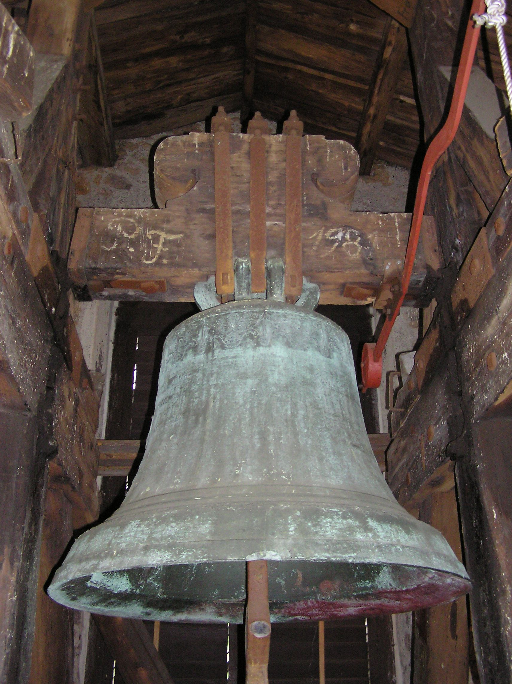 Děčín, zvon vít